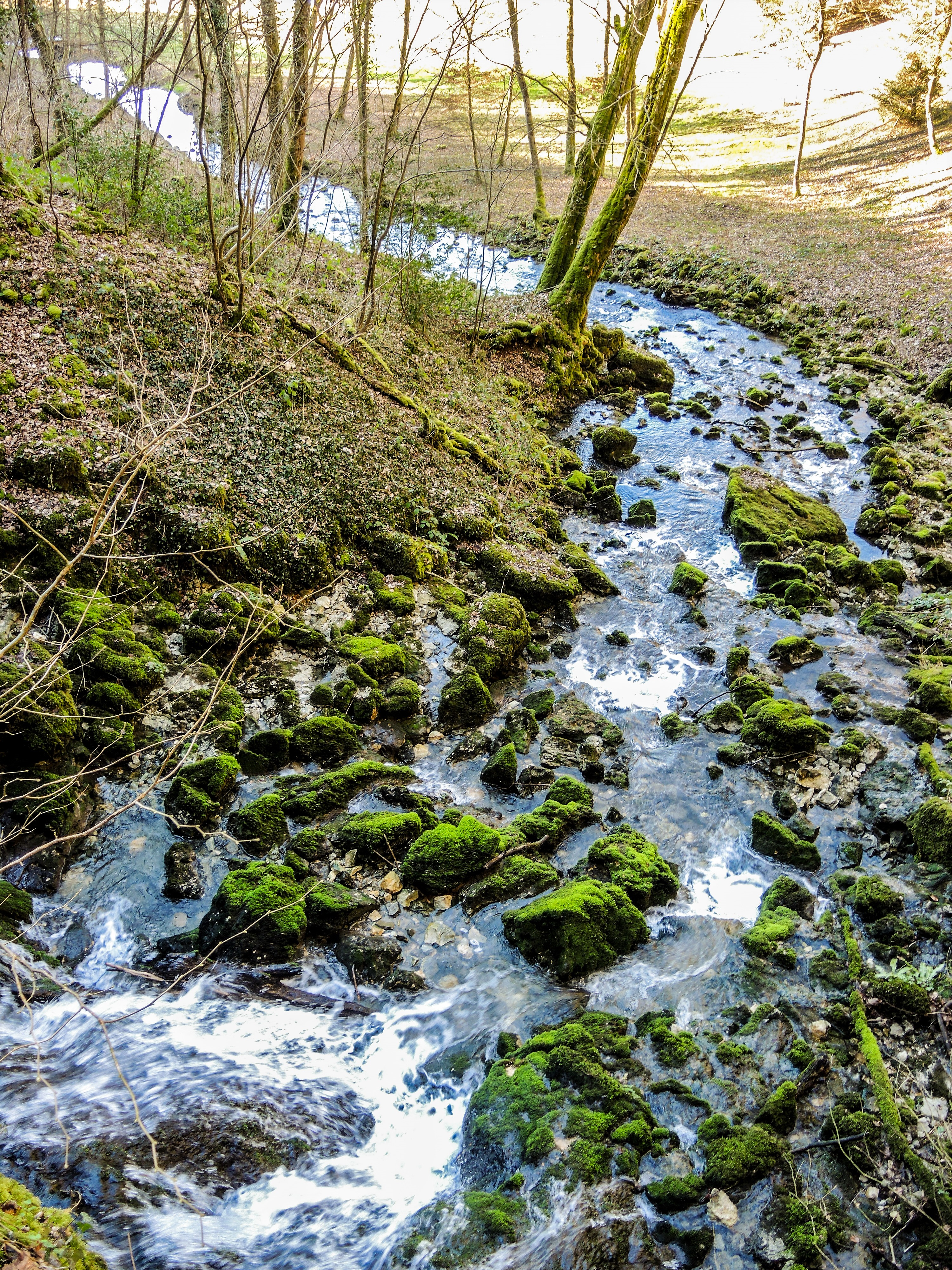 Ruisseau de la source Bergeret